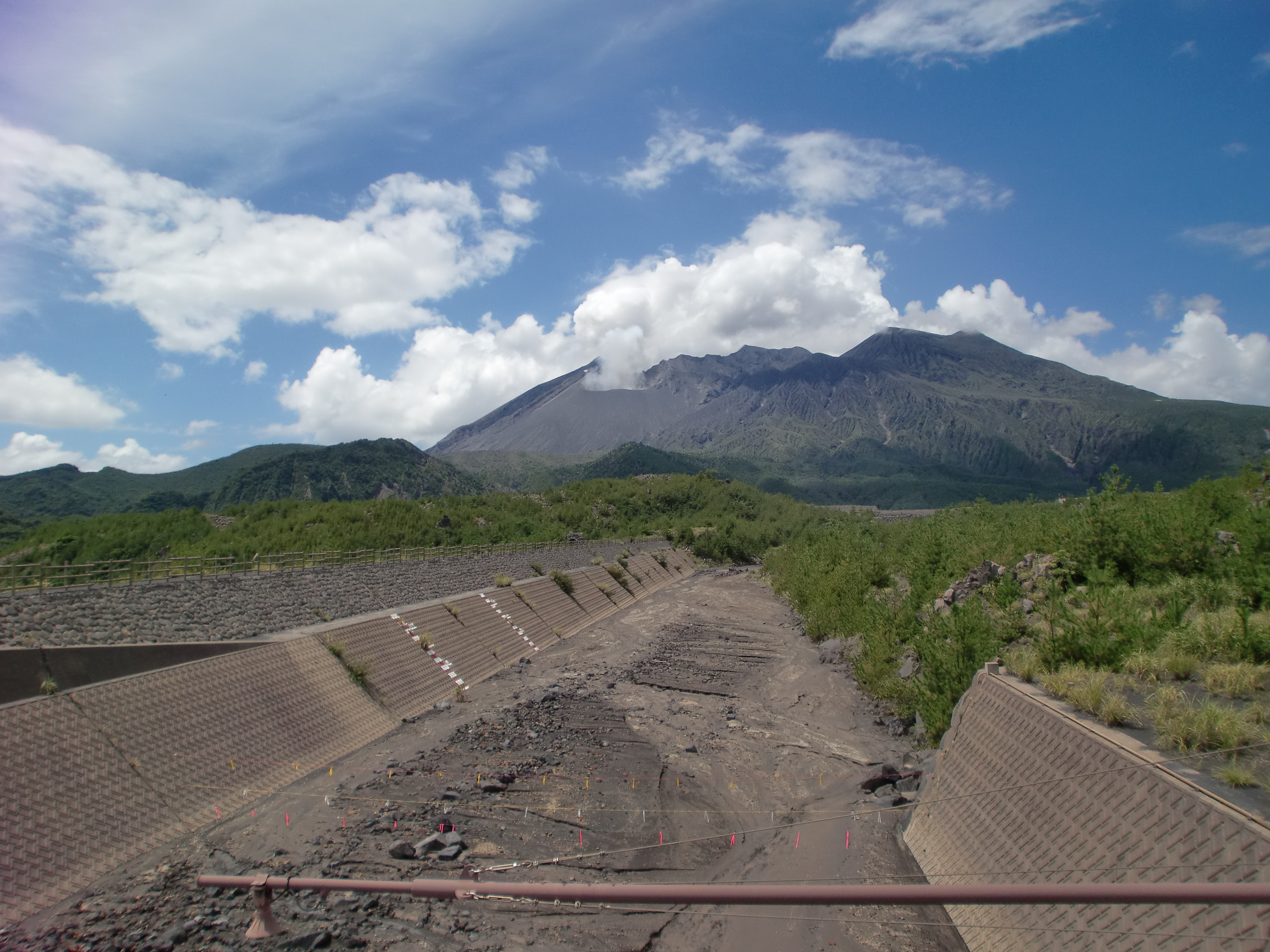 黒神川と桜島昭和火口を黒神町から望む。